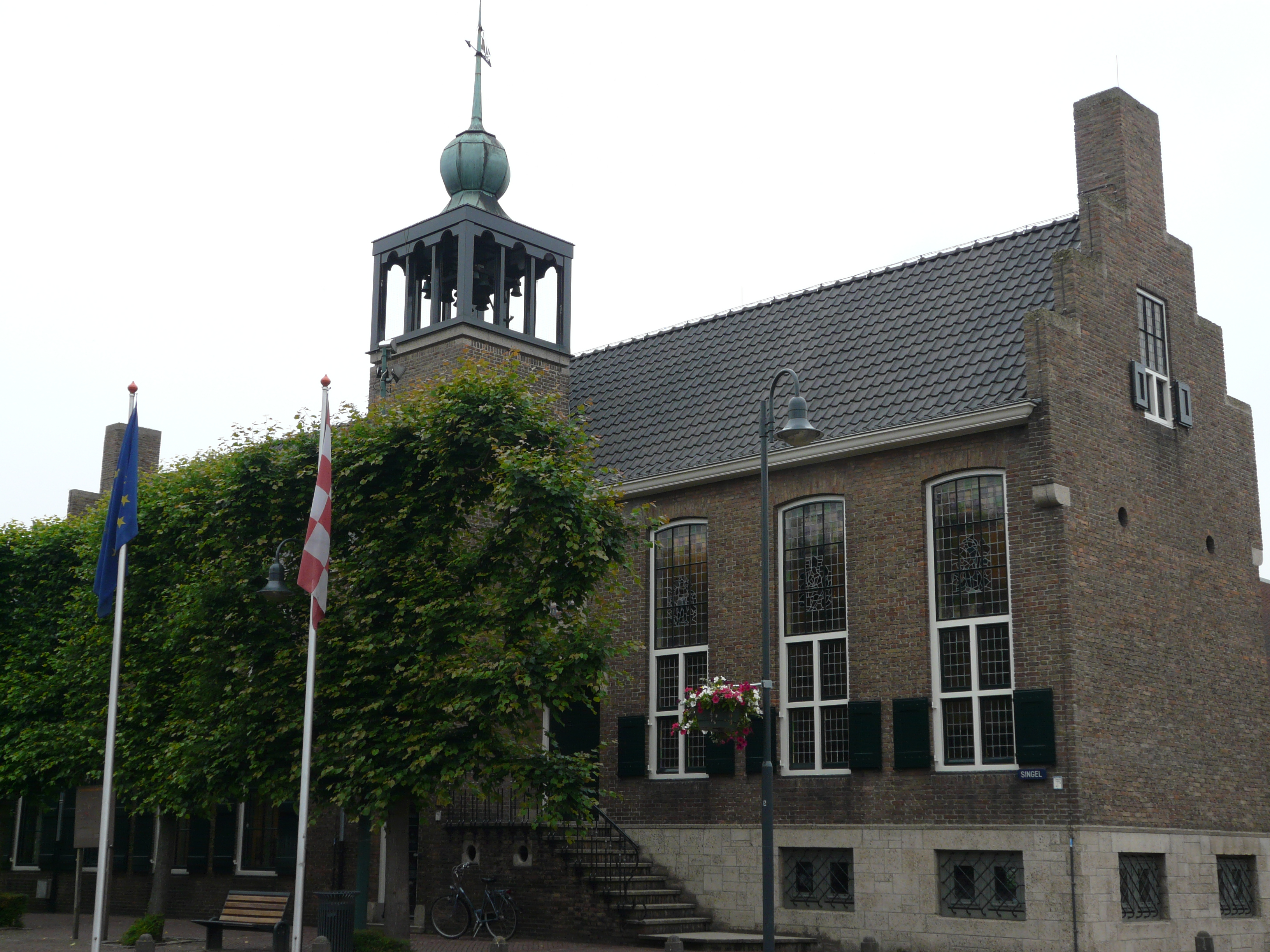 Zicht op een deel van het stadhuis van Baarle-Nassau